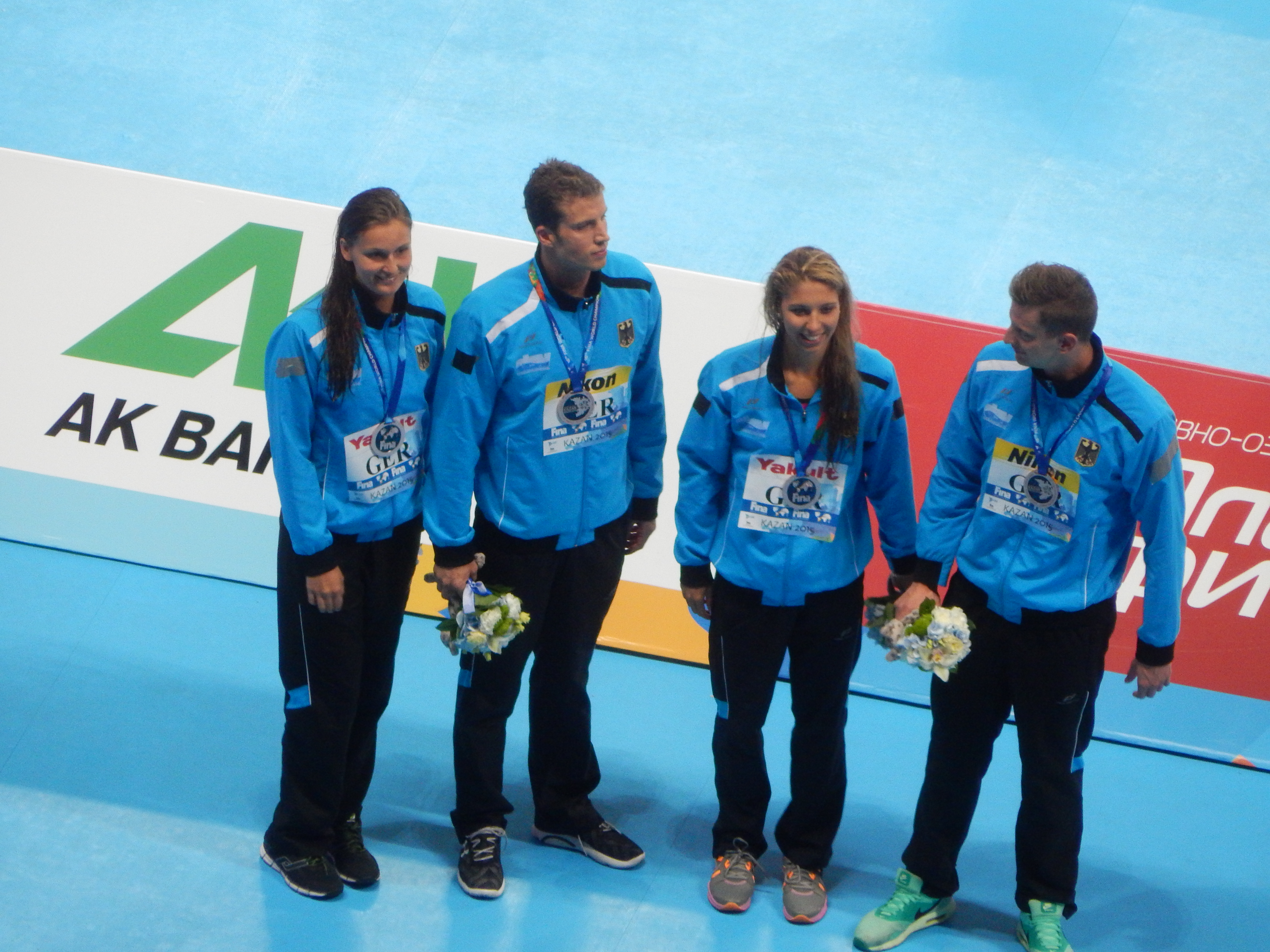 Германия берёт бронзу в смешанной комбинированной эстафете